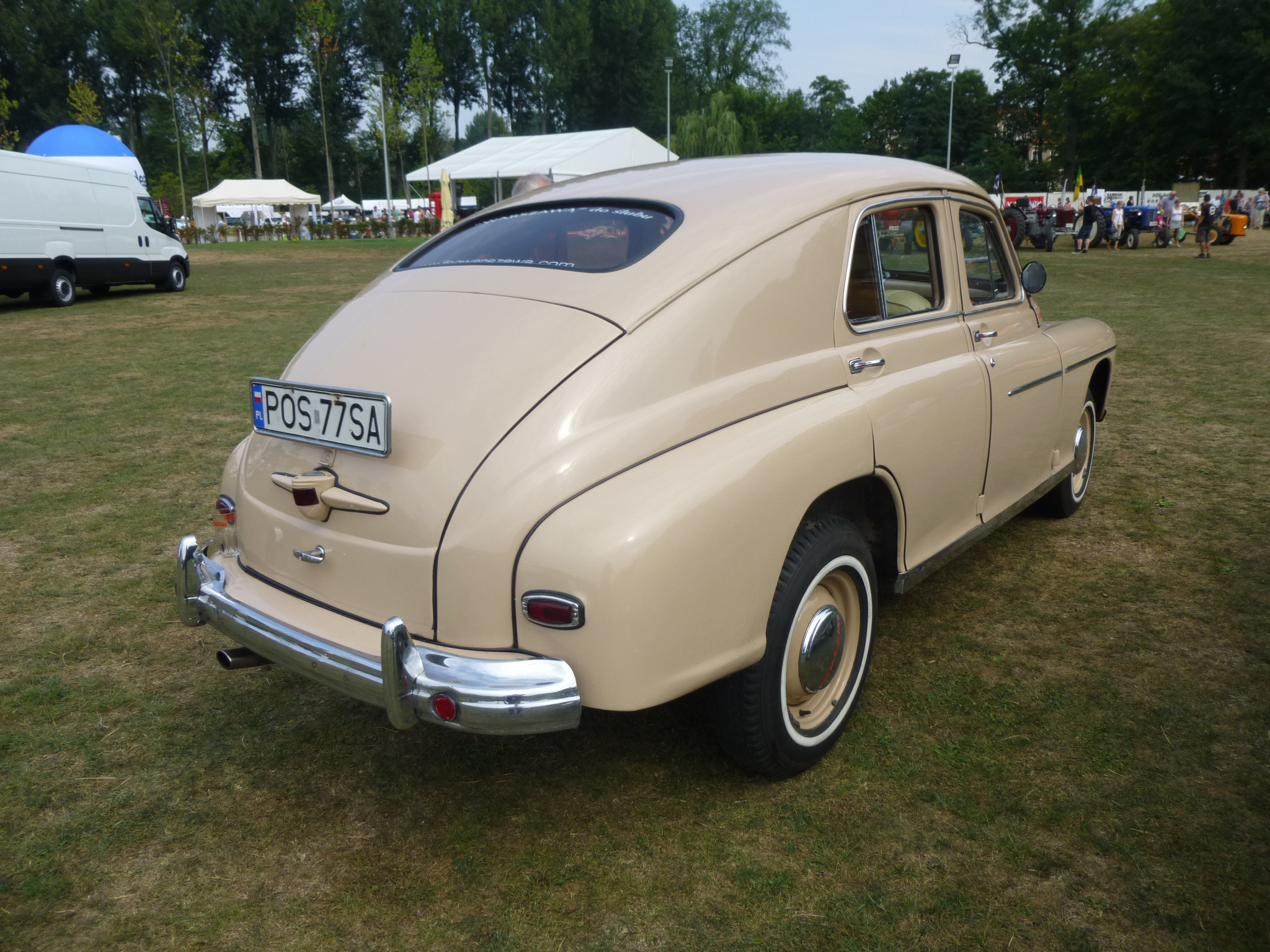 FSO Warszawa M20 at 2015 Motoclassic Wrocław